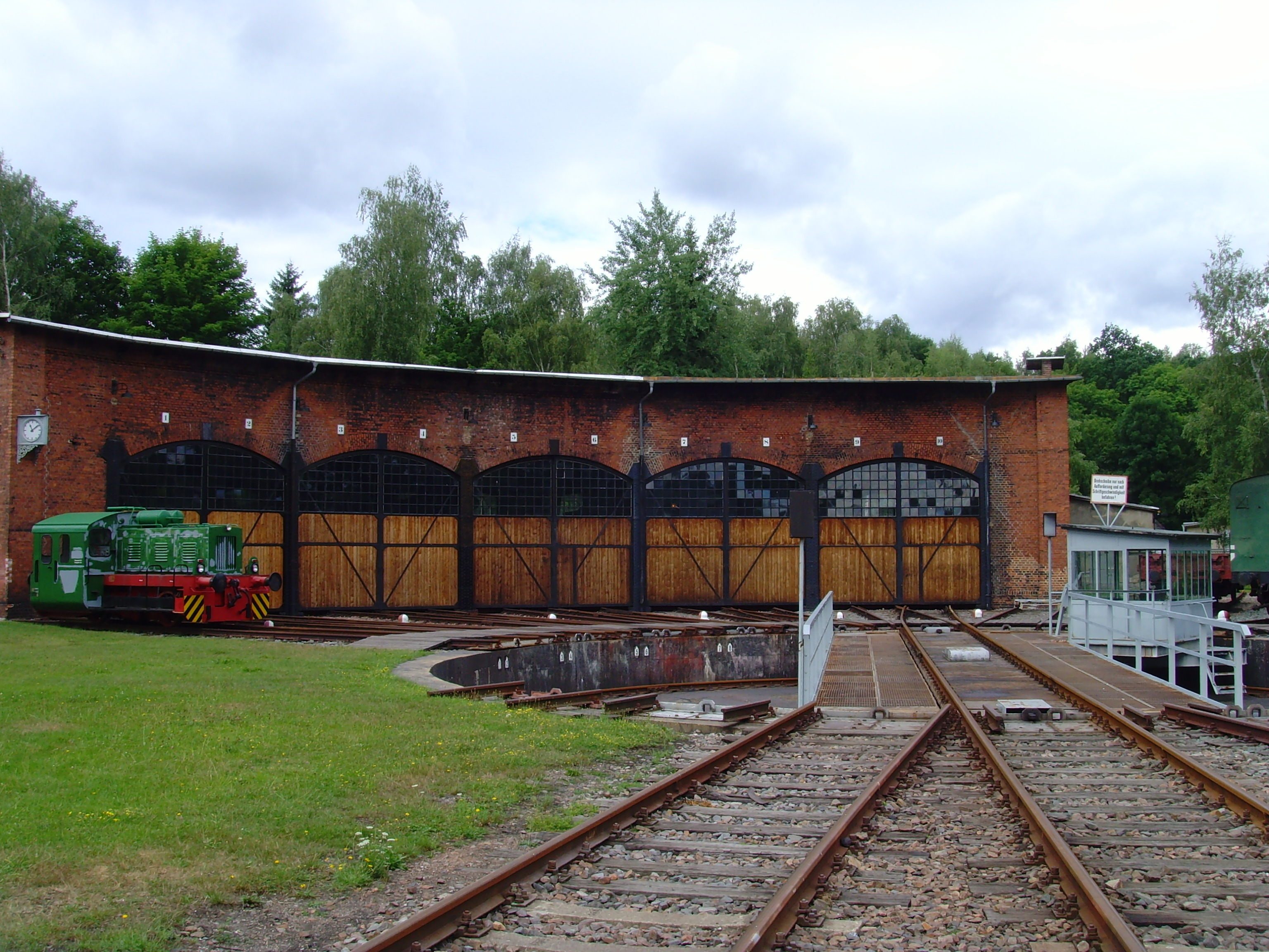 056 Eisenbahnmuseum Schwarzenberg